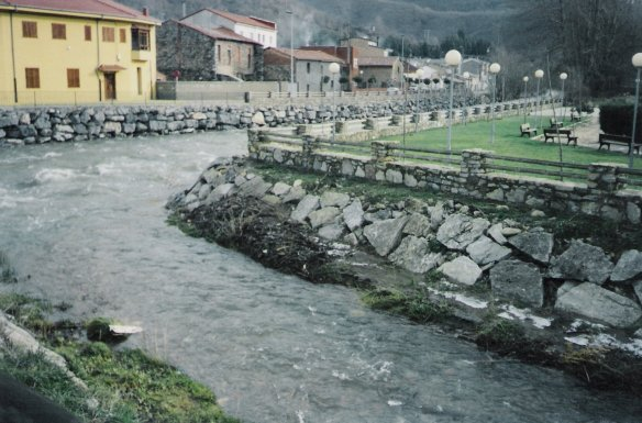 Río Bernesga a su paso por La Pola de Gordón. Autor: Santiago Pastrana